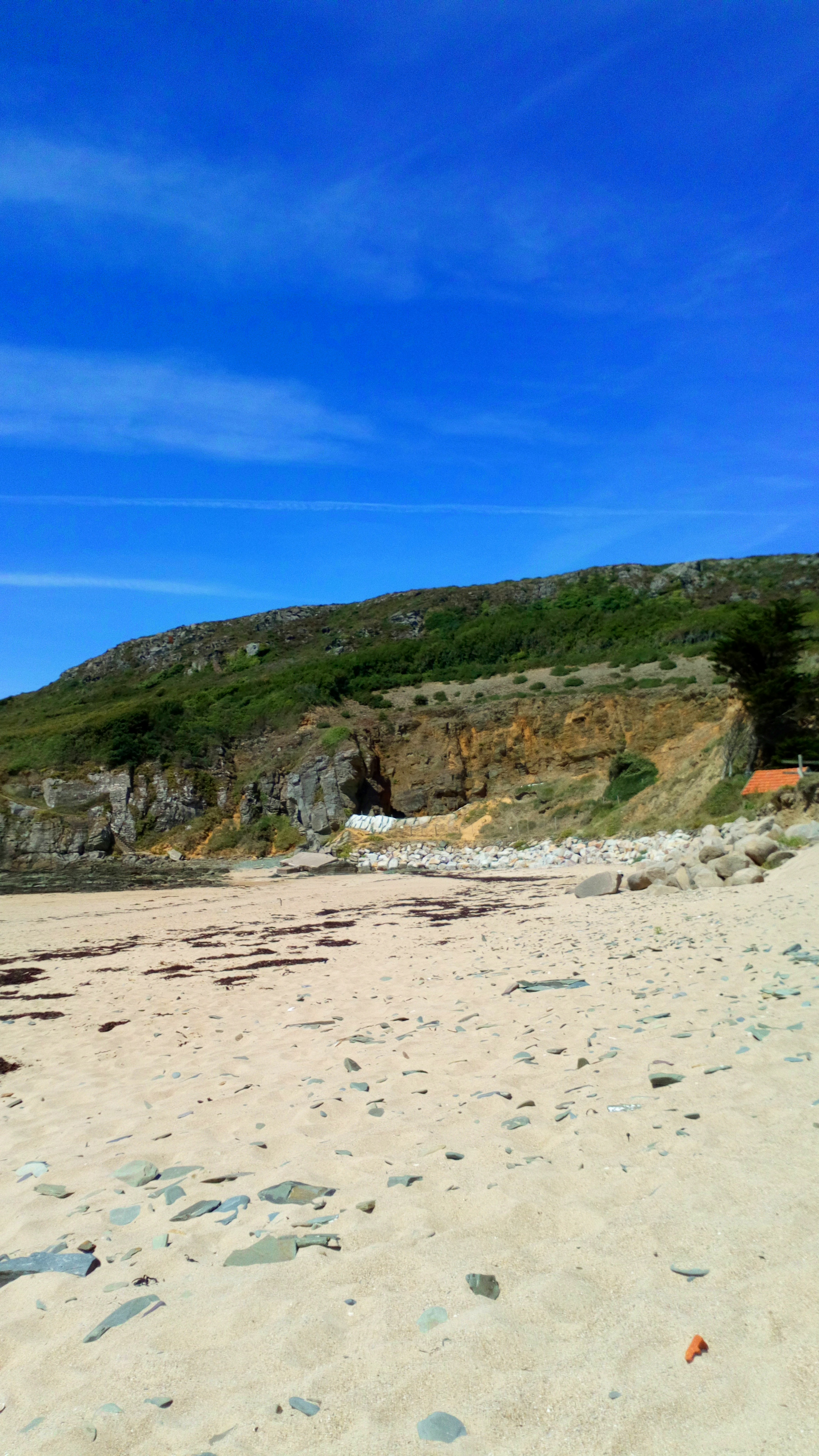 Le site dans la dune sur la pointe du Pou, dite aussi pointe du Rozel. Vu depuis la plage.